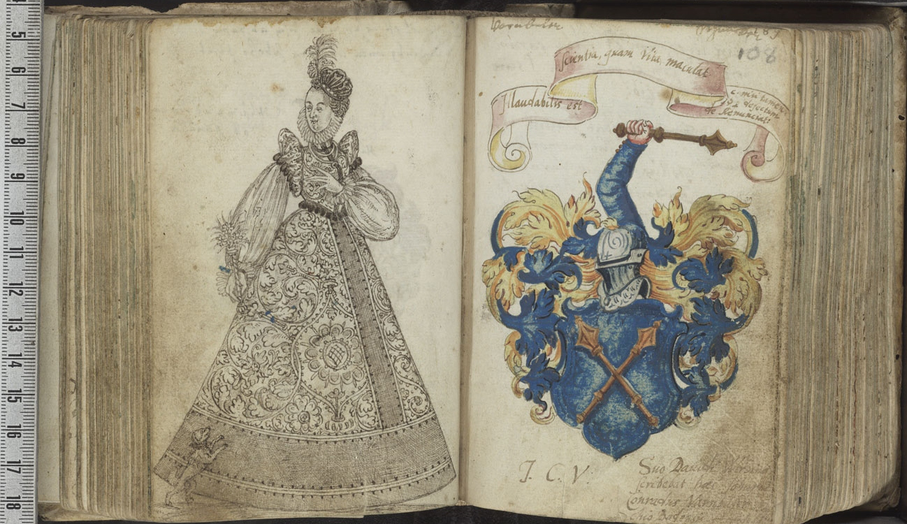 Stammbuch David Wirsung. - S.l., (Laufzeit 1565-1583), Bl. 108. Lagerort: Weimar, Herzogin Anna Amalia Bibliothek. Stammbucheintrag: Heidelberg´, 1573, durch Johann Conrad Varnbüler (1550-1609) mit Wappen der Varnbüler: In Blau zwei gekreuzte goldene Streitkolben. - Auf der gegenüberliegenden Seite Federzeichnung einer vornehmen Dame.